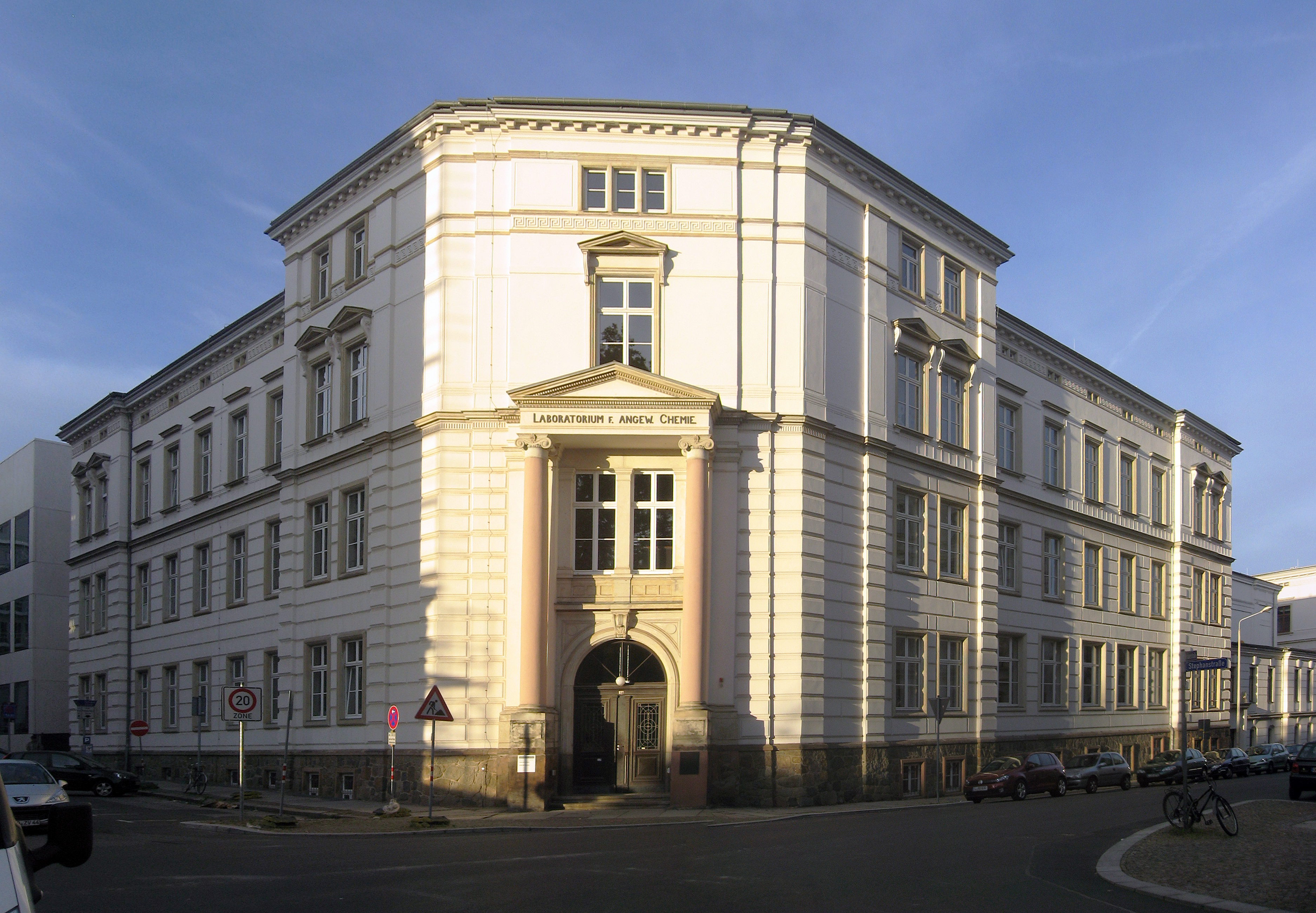 Ehemaliges „Laboratorium für Angewandte Chemie“ der Universität Leipzig